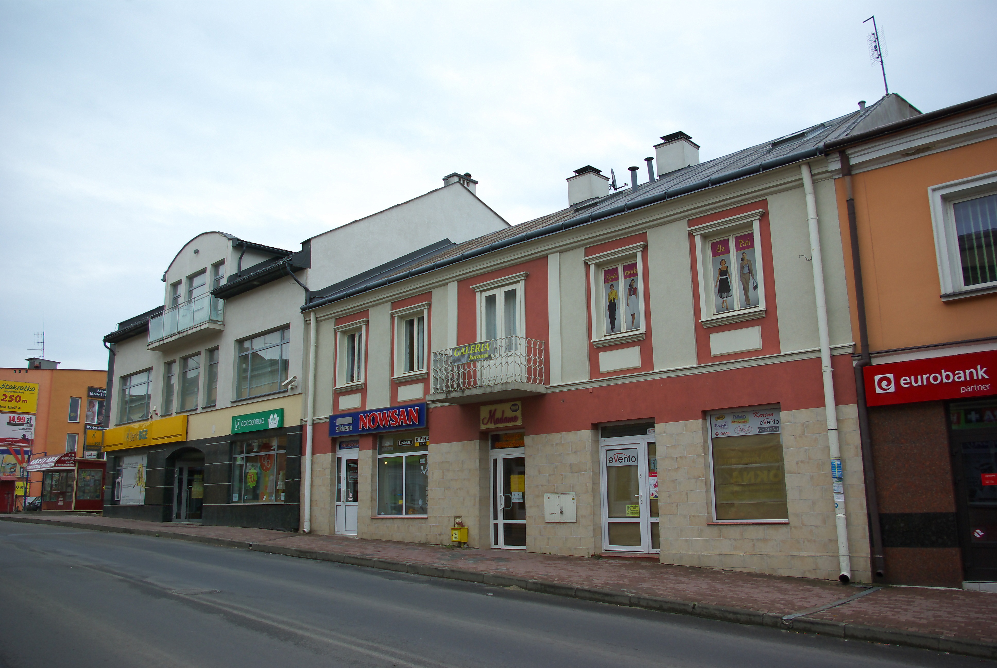 Budynki przy ulicy Jagiellońskiej 19 i 21 w Sanoku